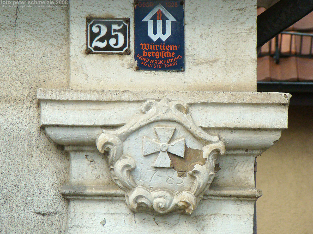 Detail am Wohnhaus des Deutschordens in Heilbronn-Biberach